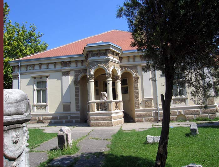 Zgrada požarevačkog muzeja